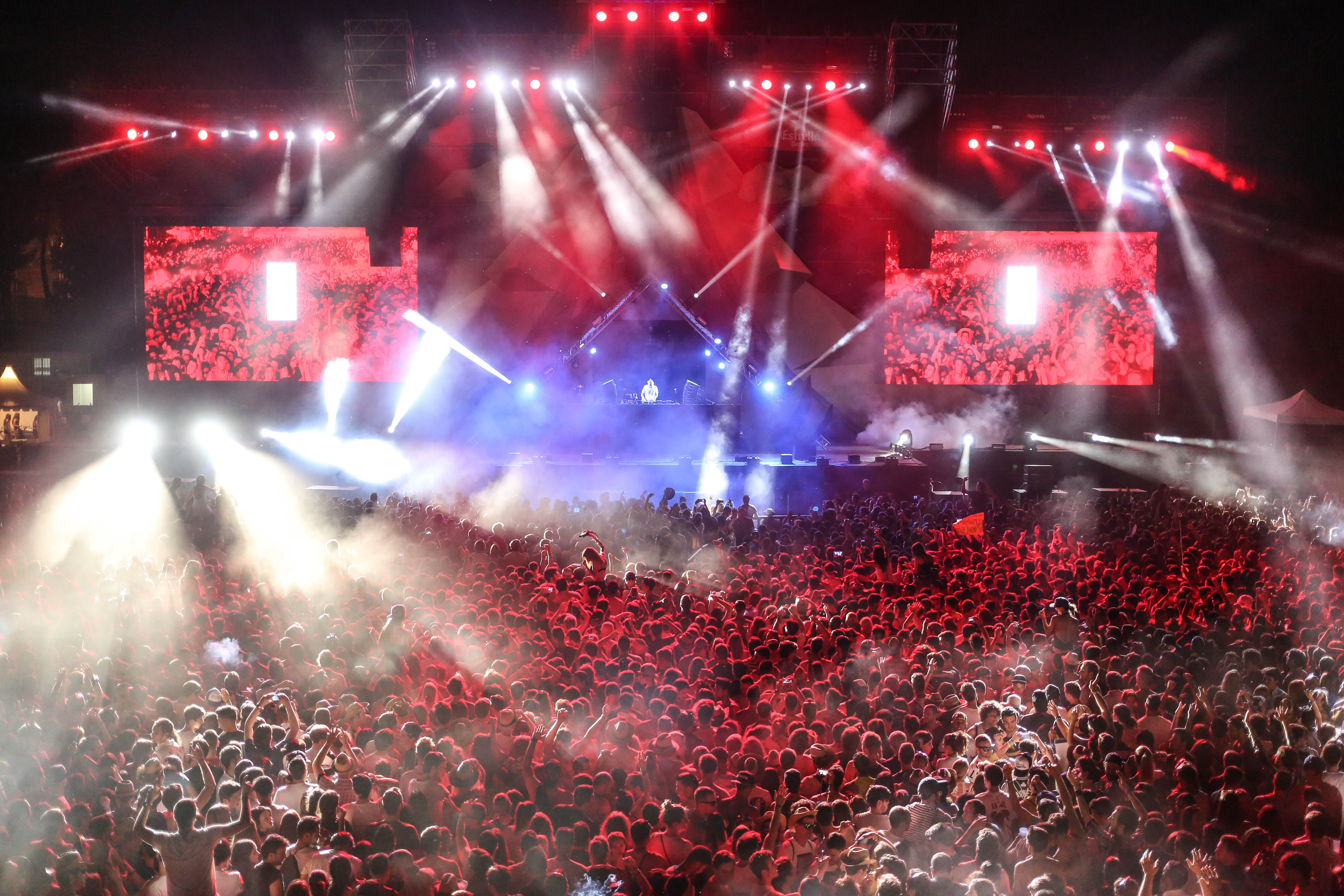 Utopía Festival 2016 (Madrid, España)